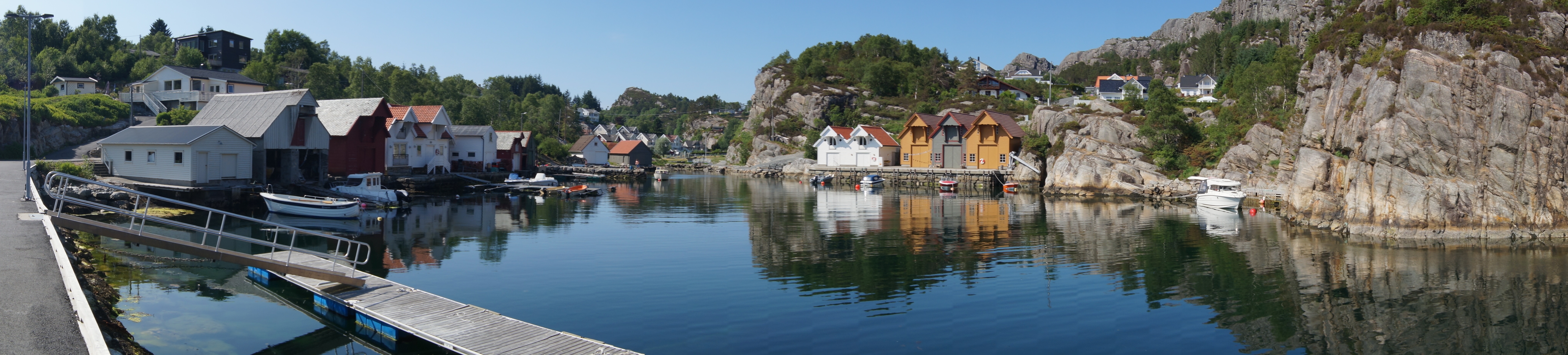 Panoramabilde fra Haganes, Fjell kommune